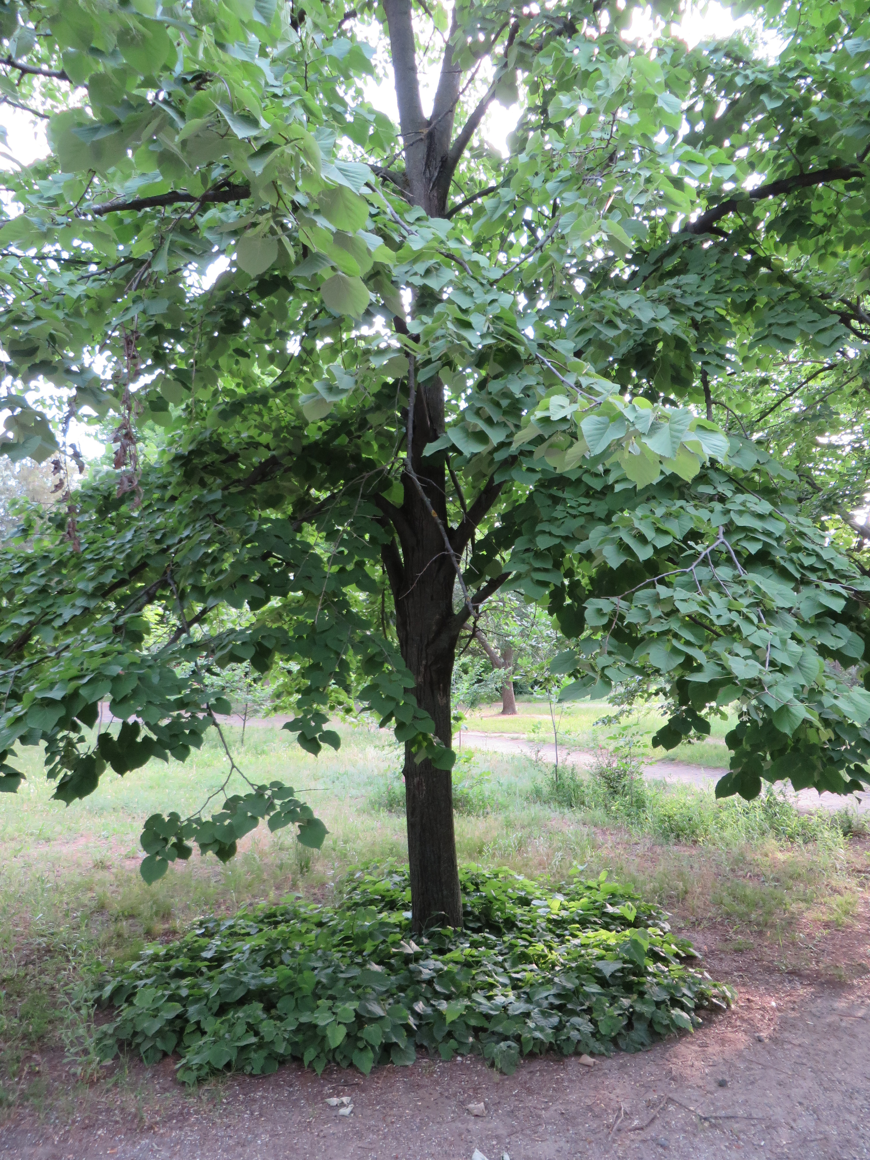 Парк ім. Петровського, м. Миколаїв